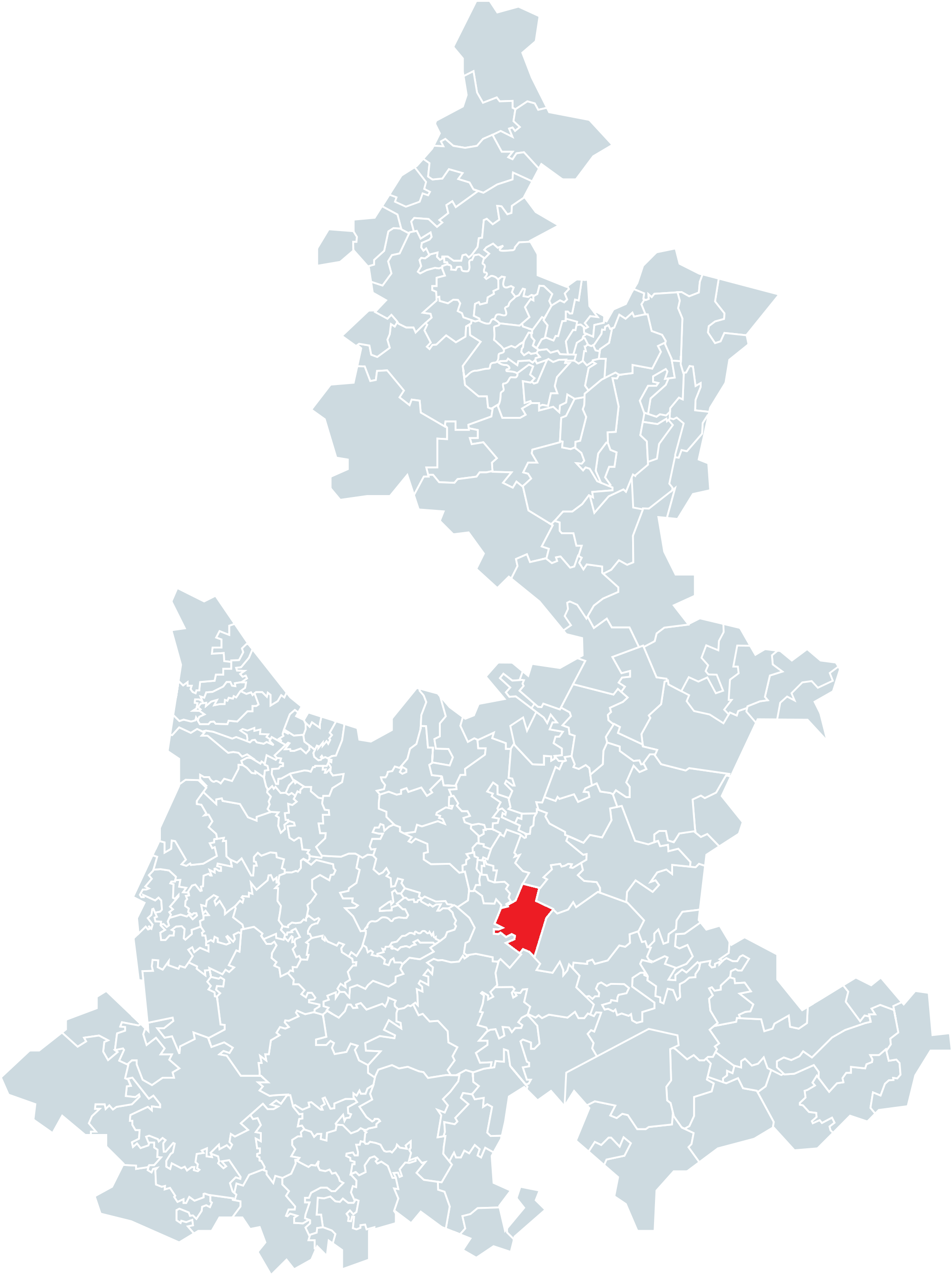 Municipio de Xochitlán Todos Santos